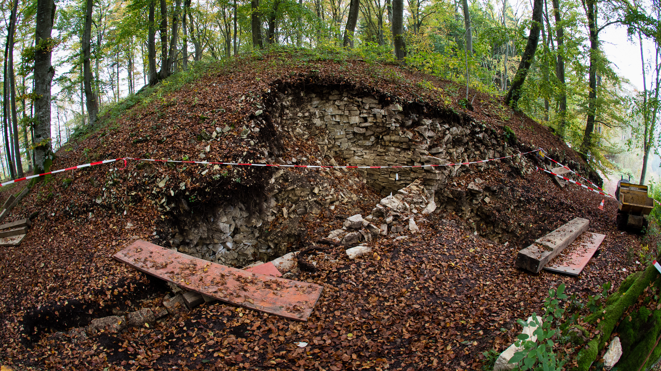 Keltische Trockenmauern auf dem Burgberg der Burg Emerfeld ("Alte Burg") bei Langenenslingen.